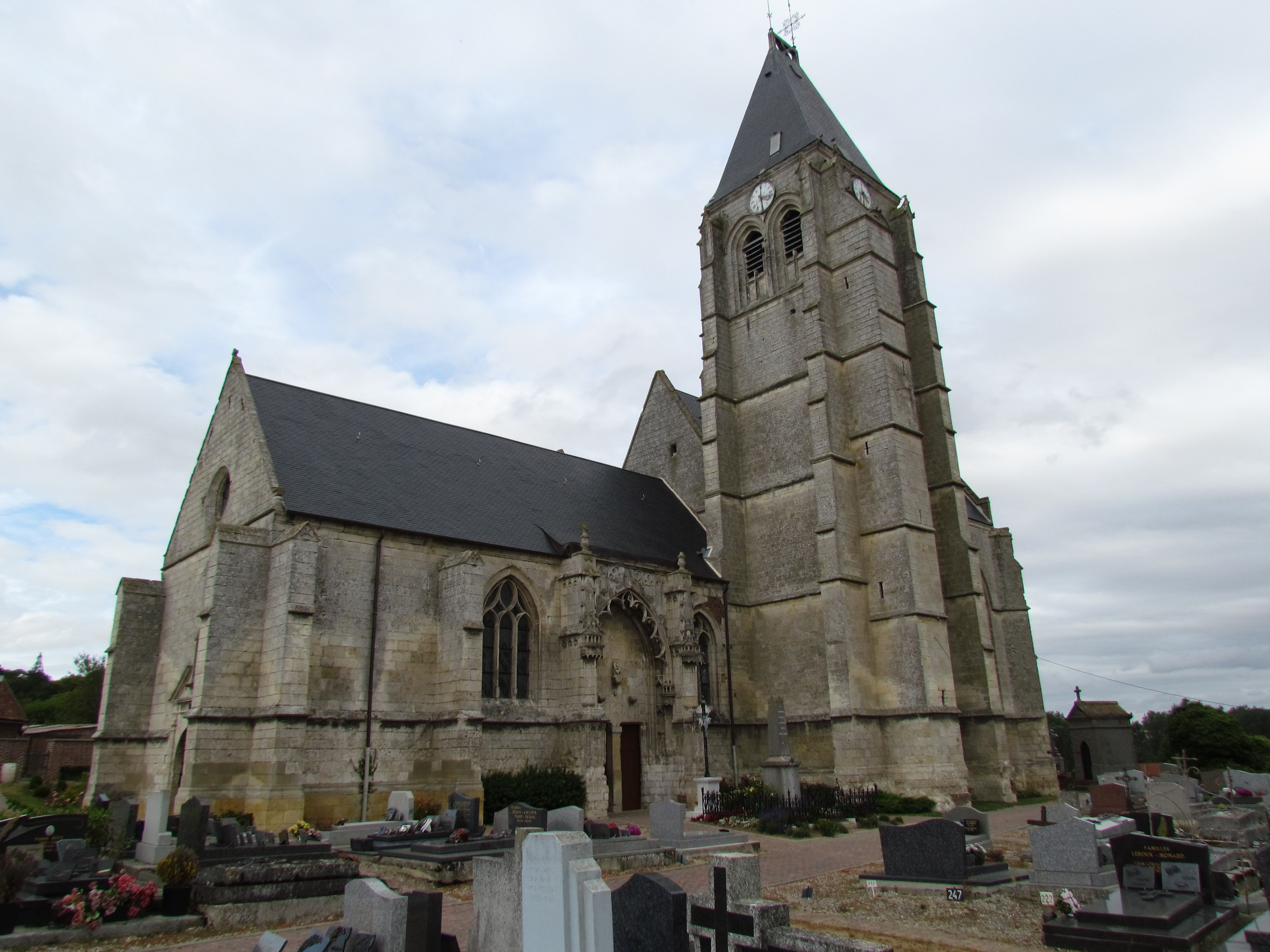 Église Saint-Denis de Paillart, (Classé, 1992) .